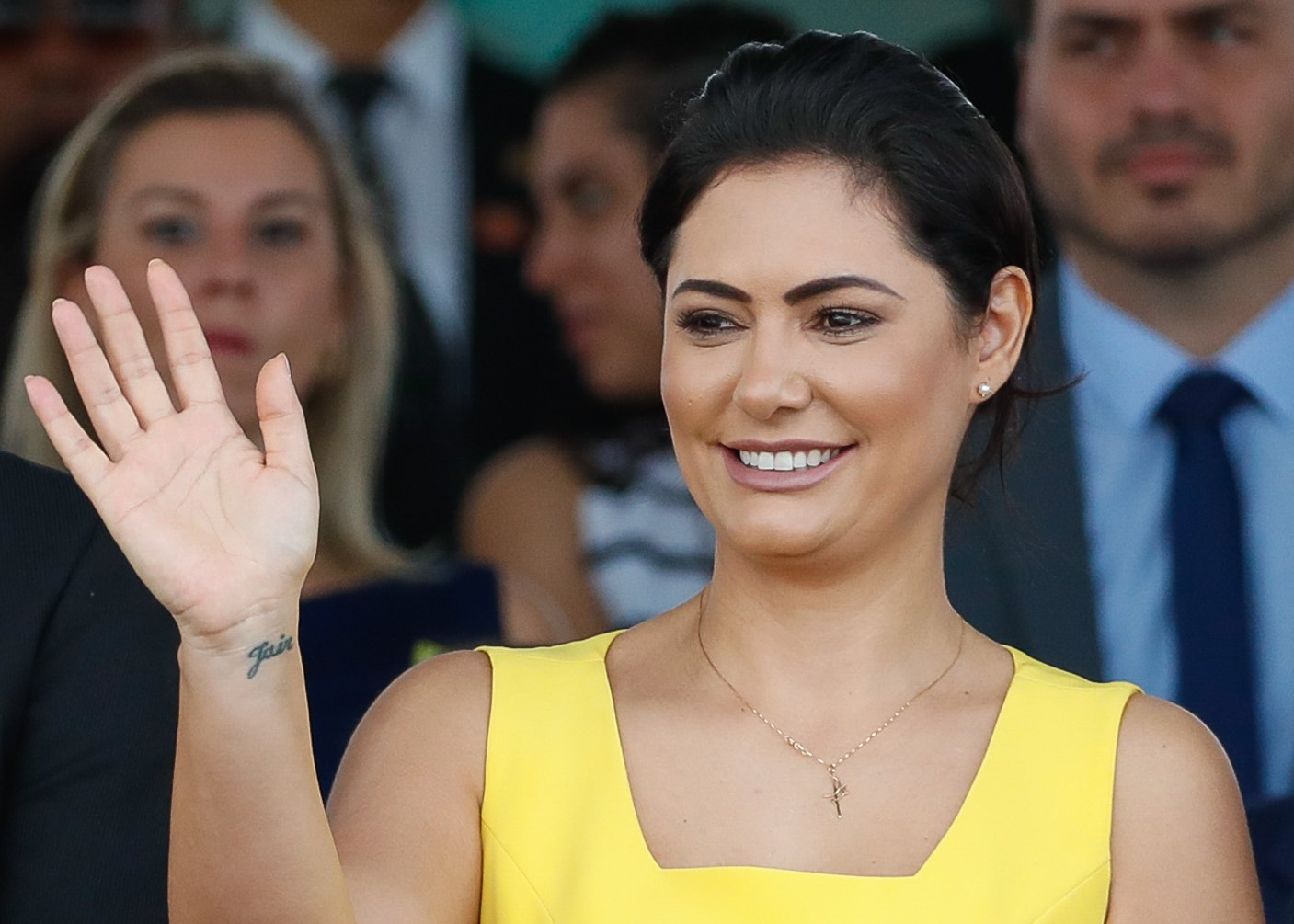 (Brasília - DF, 07/09/2019) Presidente da República, Jair Bolsonaro, durante desfile Cívico por ocasião do Dia da Pátria. Foto: Alan Santos/PR